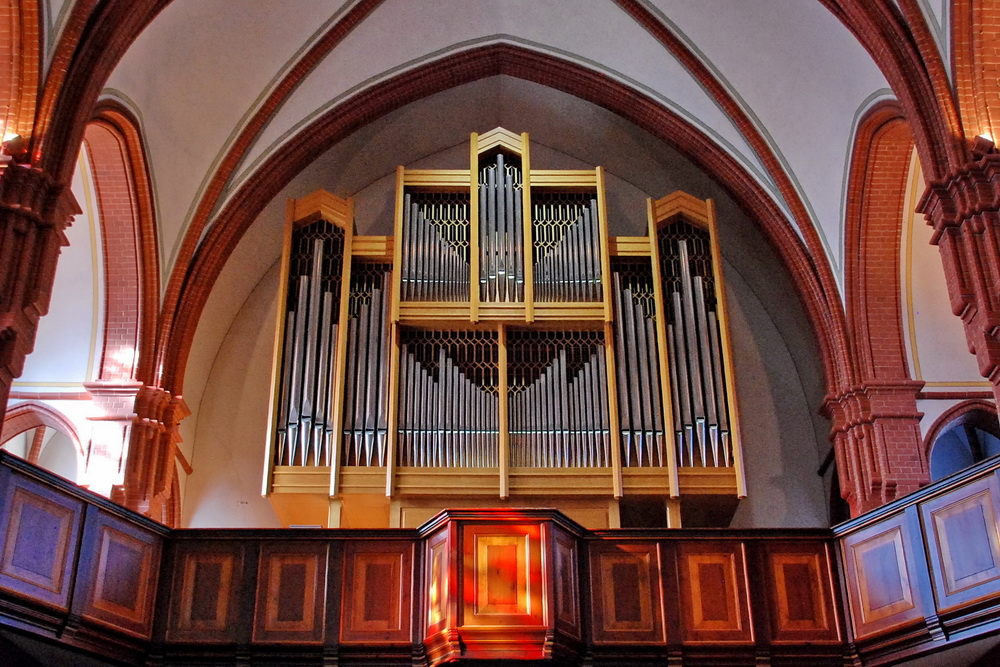 Orgel der Dreieinigkeitskirche in Eschweiler, Nordrhein-Westfalen, Deutschland